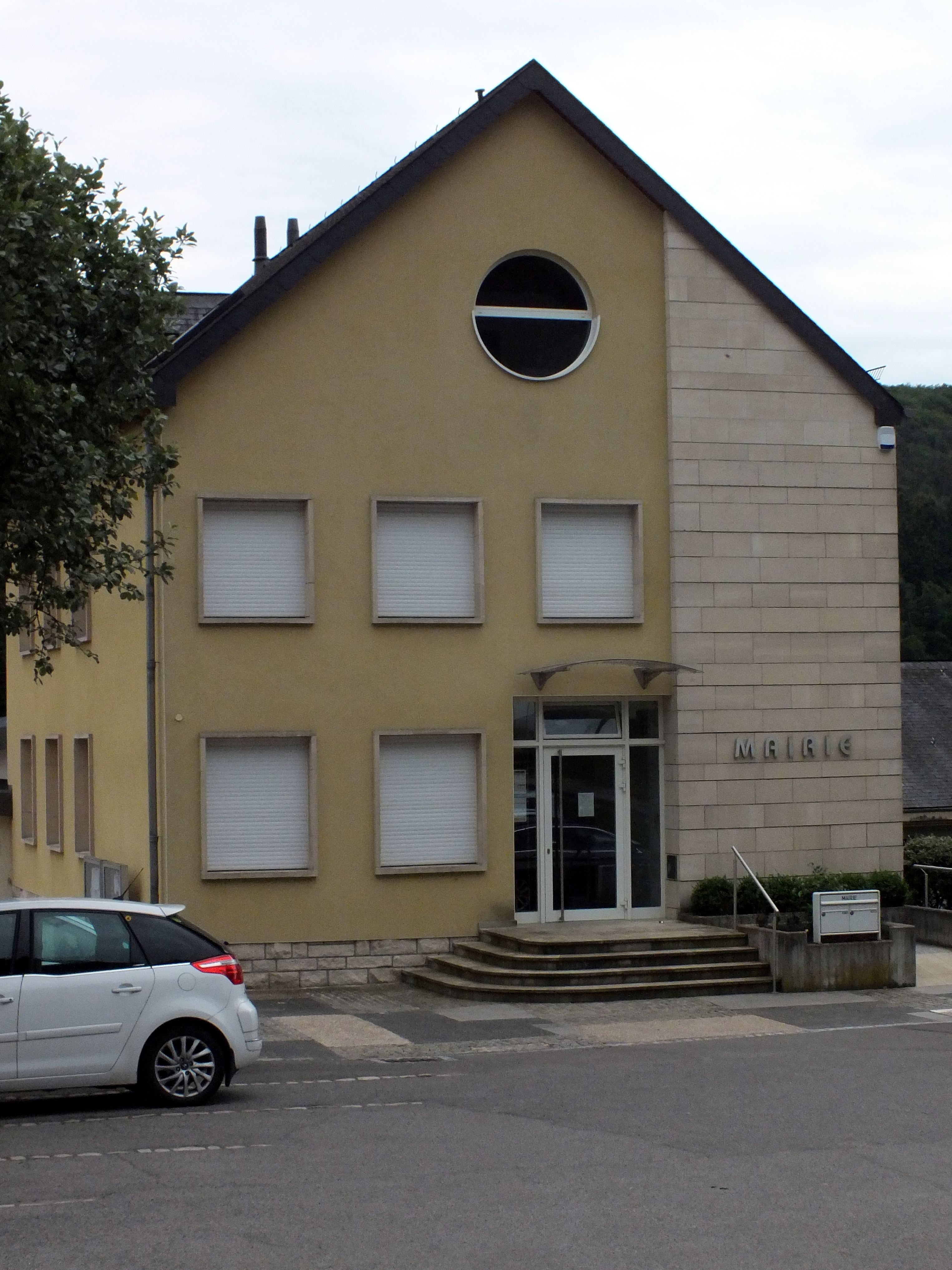 D'Märei zu Simmer.